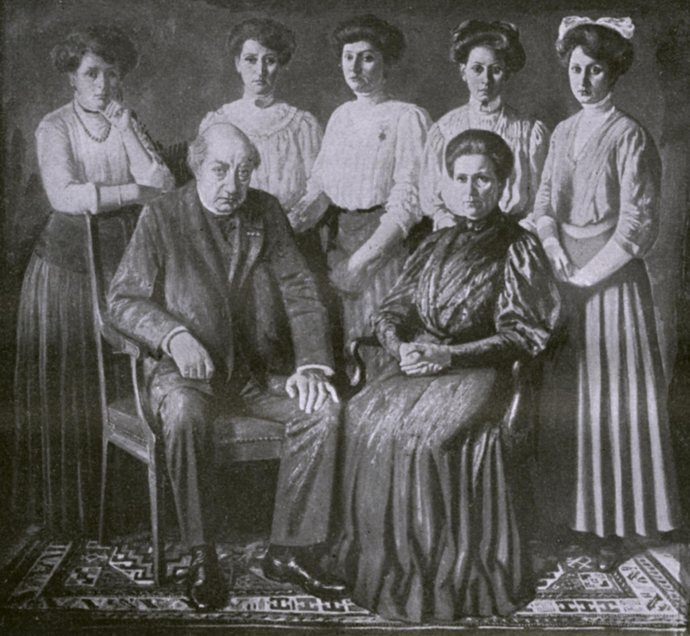 Portret van Wilhelmus Bernardus Gerardus Molkenboer (1844-1915), Maria Cecilia Petronella Johanna der Kinderen (1848-1934) en vijf van hun dochters, t.w. Theodora Johanna Maria, Helena Euphemia, Euphemia Hendrika Maria, Anna Maria en Leonie Marie Antoinette Margot, Henriette Maria ontbreekt